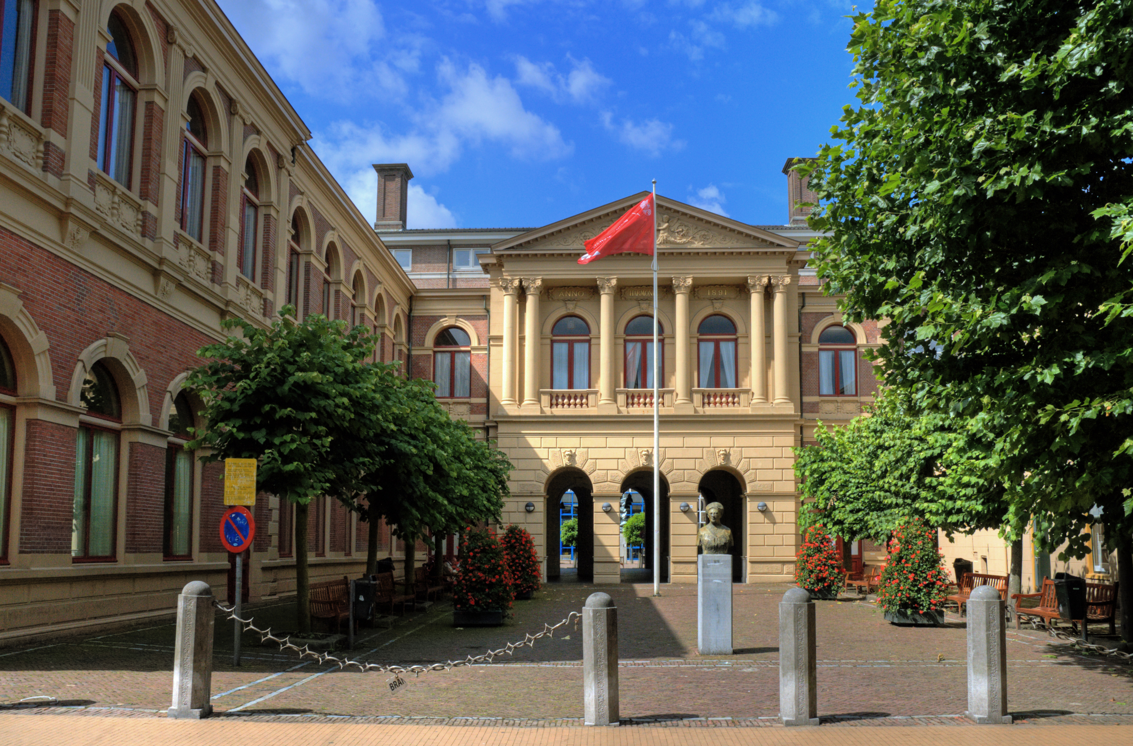 Ingang van De Harmonie (1980), gebouw van de faculteiten Letteren en Rechten van de Rijksuniversiteit Groningen. Hier stond tussen 1856 en 1973 de concertzaal van Groningen (nu in De Oosterpoort). De ingang naar het gebouw doet sterk denken aan façadisme (zij het dat het hele gebouw eerst werd gesloopt) en valt zo niet uit de toon in de Kijk in 't Jatstraat. De Achter de poort bevindt zich de binnenplaats van het complex met aan de ene kant de standaard flats van de universiteit en aan de andere zijde de Uurwerkersgang.